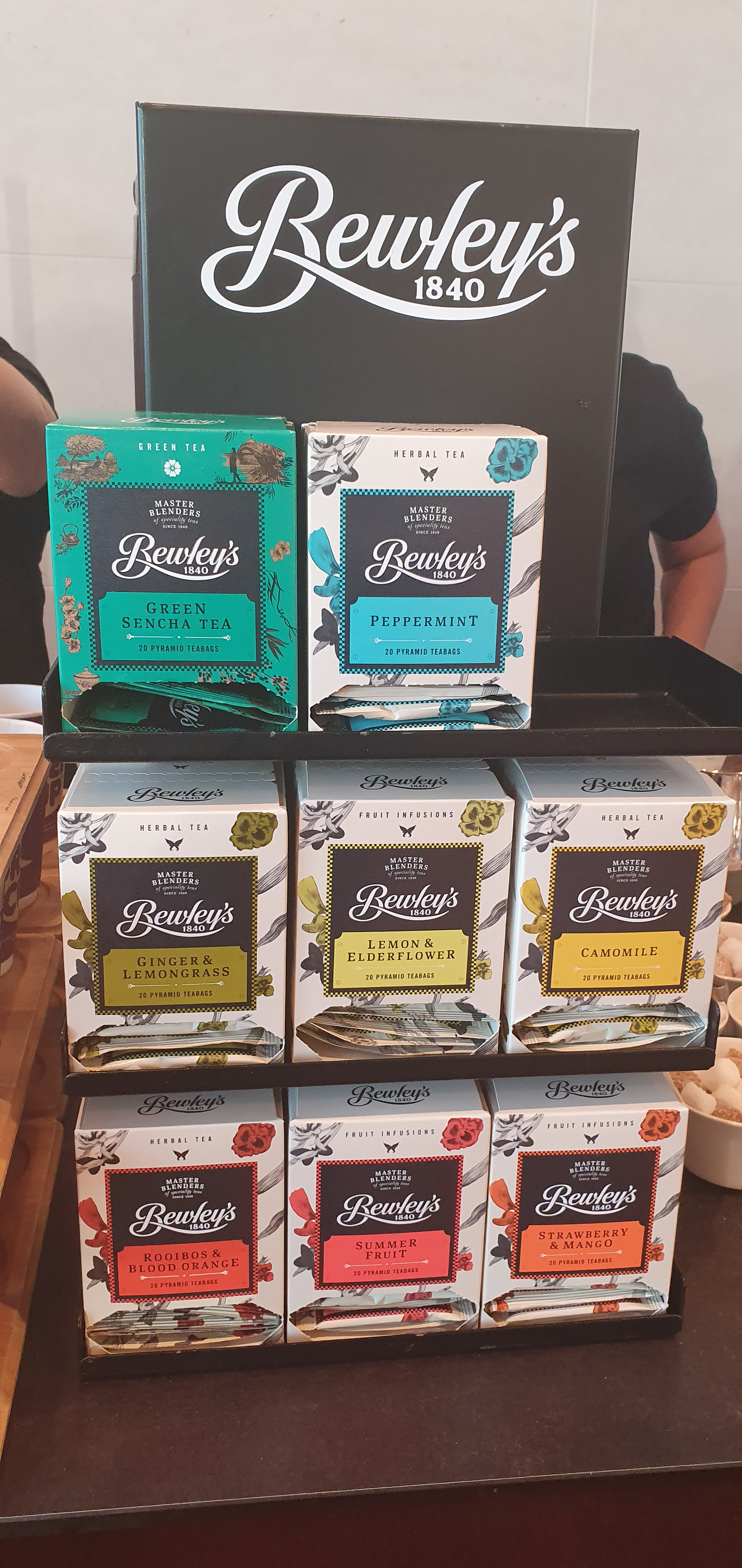 Étal de thés Bewley's à dublin